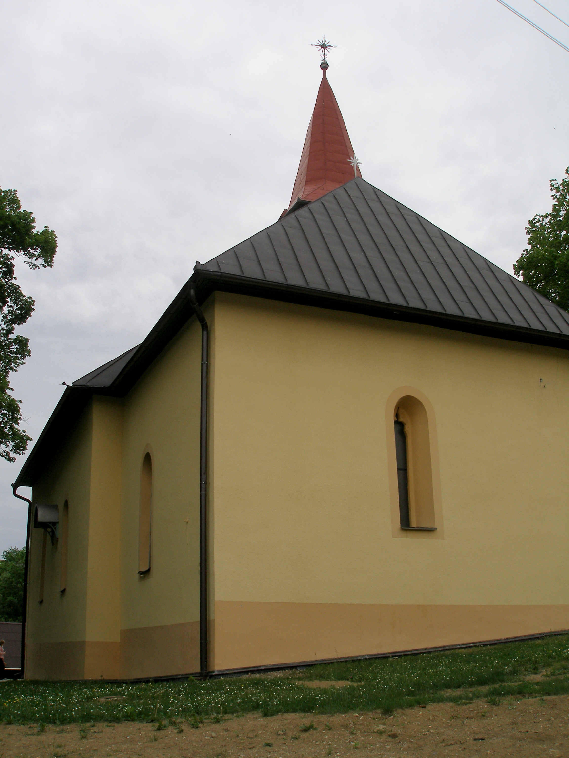 Obec Krivany okres Sabinov